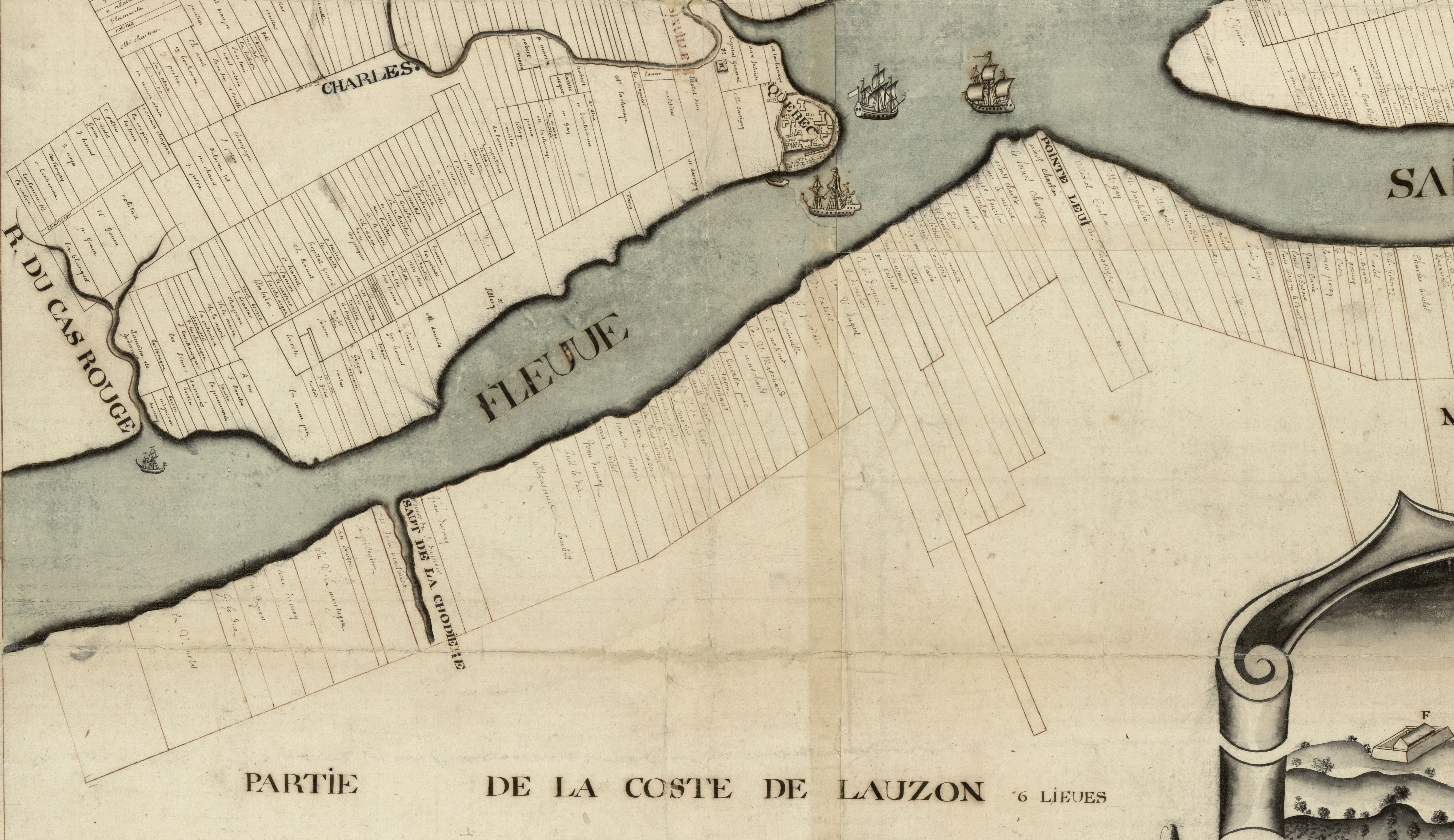 Détail montrant la « Coste de Lauzon » Carte du gouvernement de Québec levée en l'année 1709 par les ordres de Monseigneur le Comte de Ponchartrain commandeur des ordres du Roy ministre et secrétaire d'estat / par le Sr. Catalogne lieutenant des troupes ; et dressée par Jean Bte Decoüagne